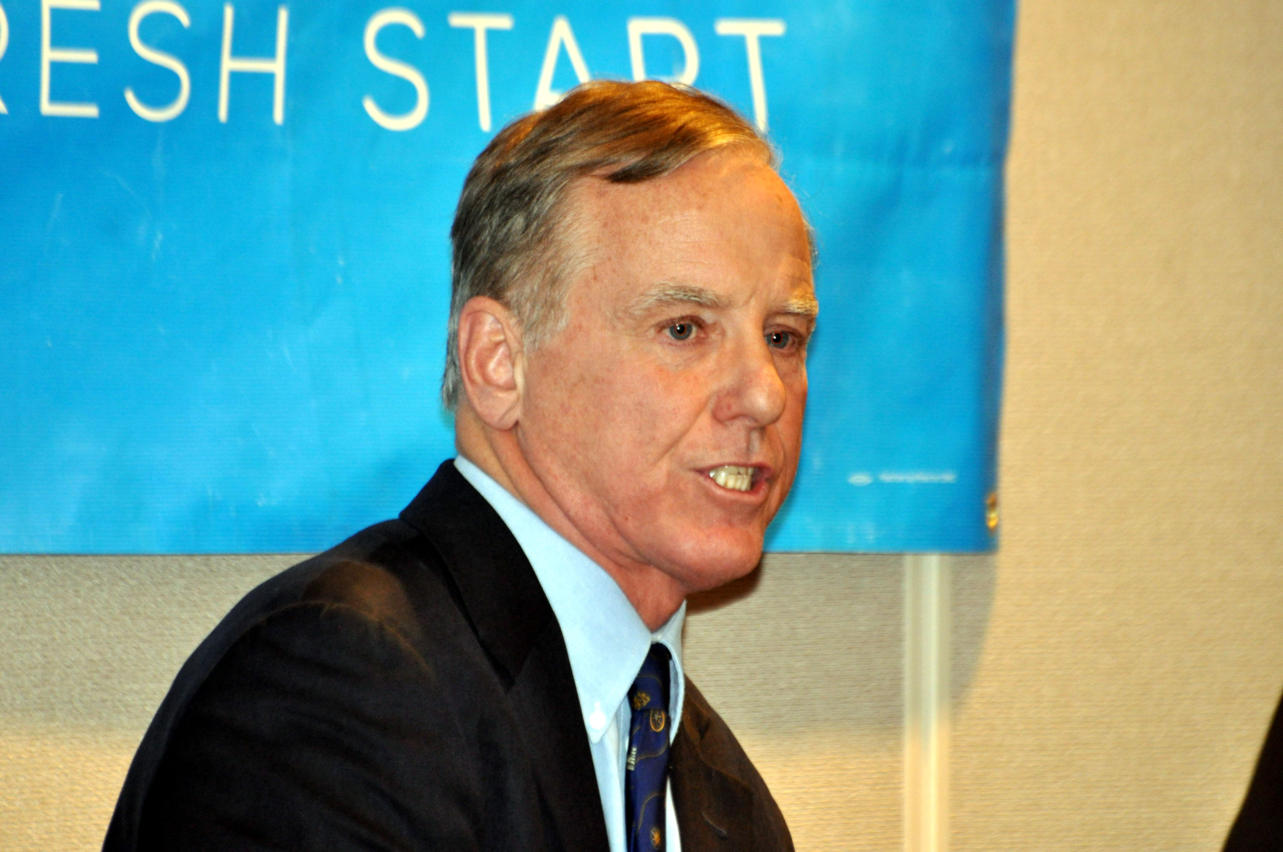 DNC Winter Meet 0072 Howard Dean